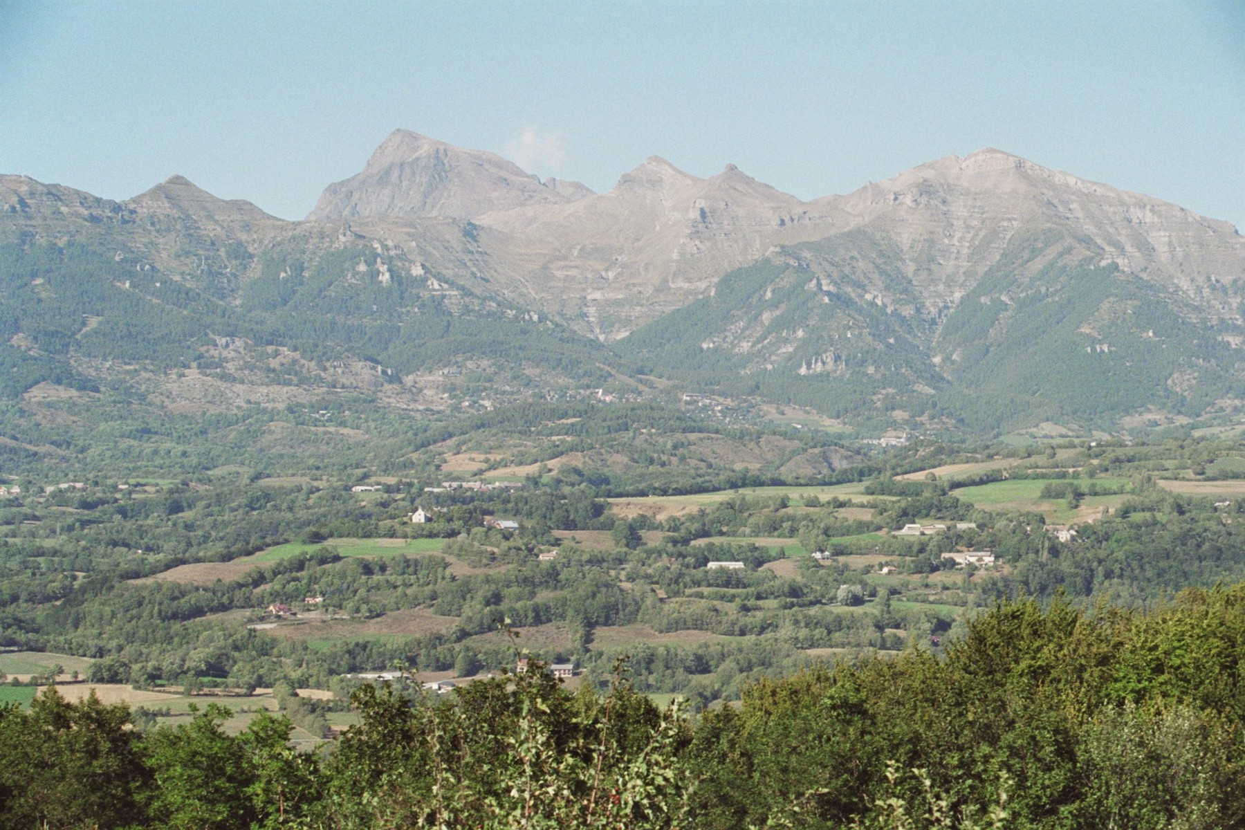 Le bocage du haut-Champsaur et le massif de Vieux Chaillol